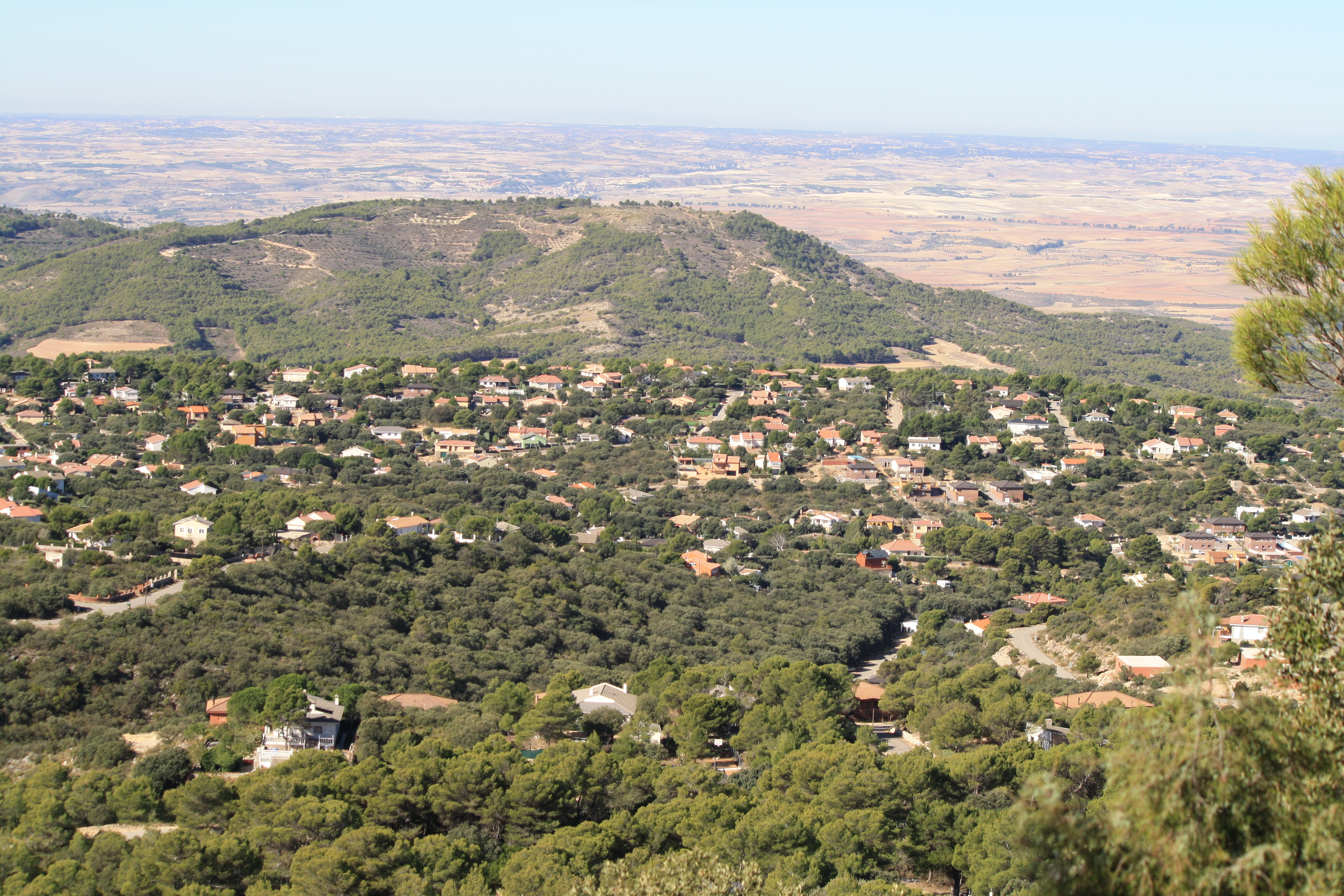 Urbanización Nueva Sierra de Madrid Albalate de Zorita Provincia de Guadalajara Castilla-La Mancha España